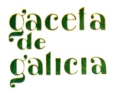 Gaceta de Galicia